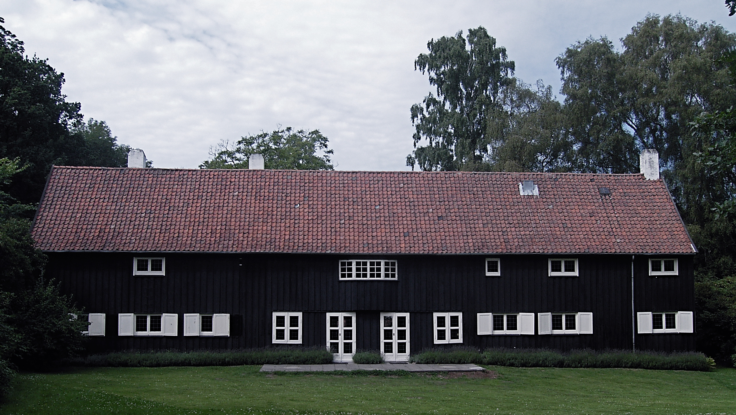 Hegnslund at Strandvejen in Copenhagen, Denmark. Architect: Henning Hansen